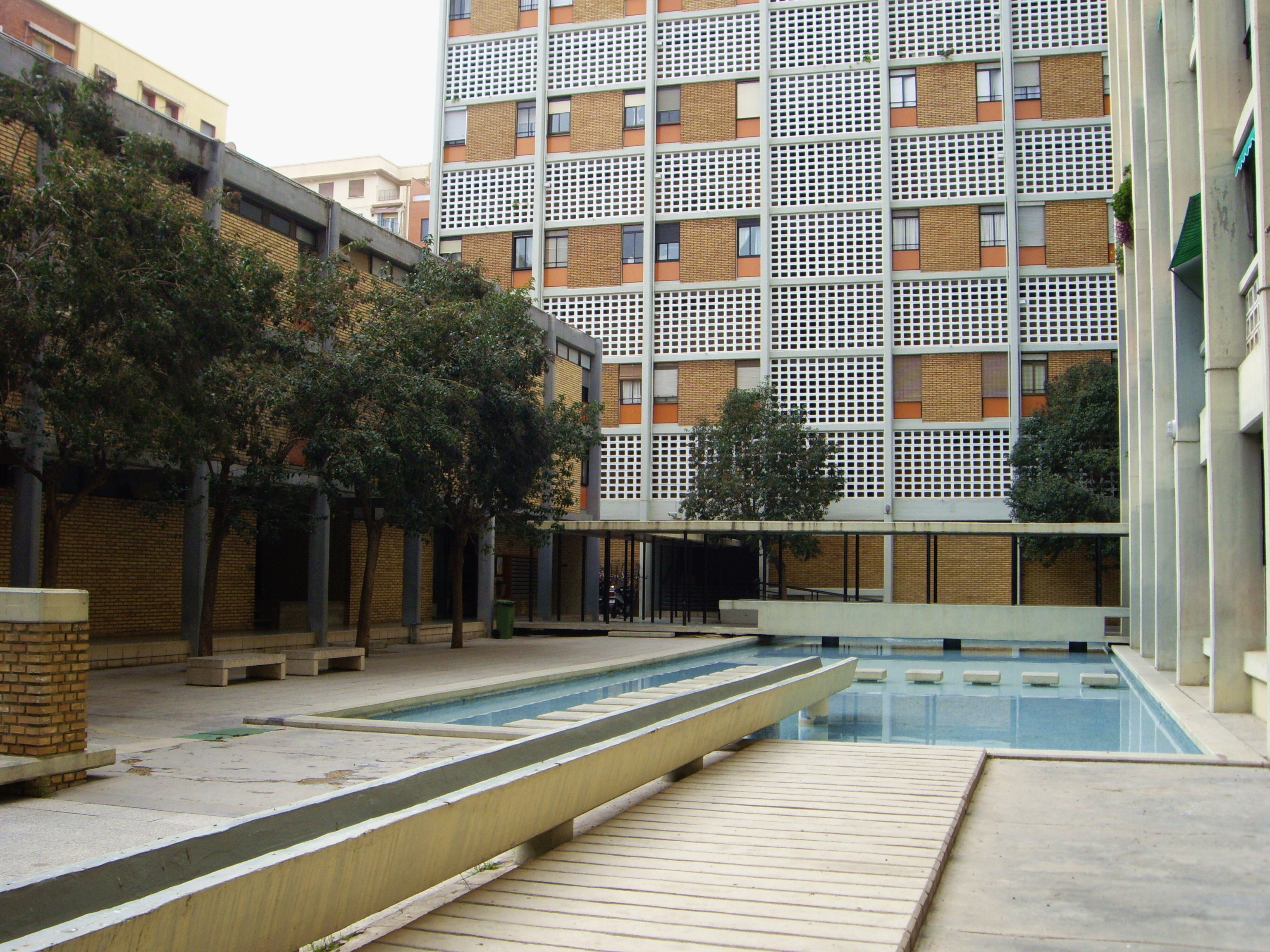 Pati interior de l'edifici Santa Maria Micaela de València.